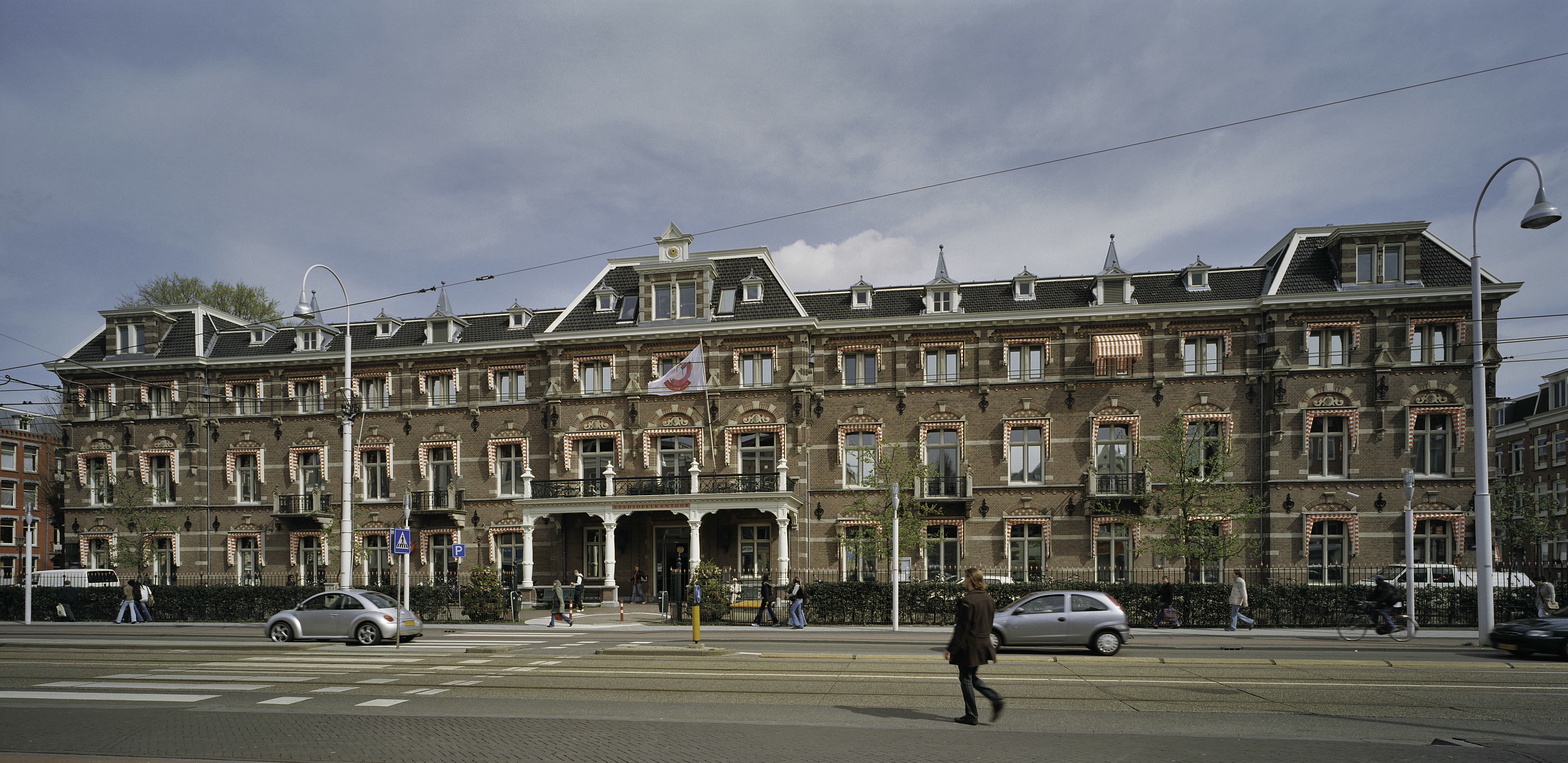 Burgerziekenhuis, voormalig: Overzicht voorzijde met ingangsportaal (opmerking: Gefotografeerd voor Monumenten In Nederland Noord-Holland)